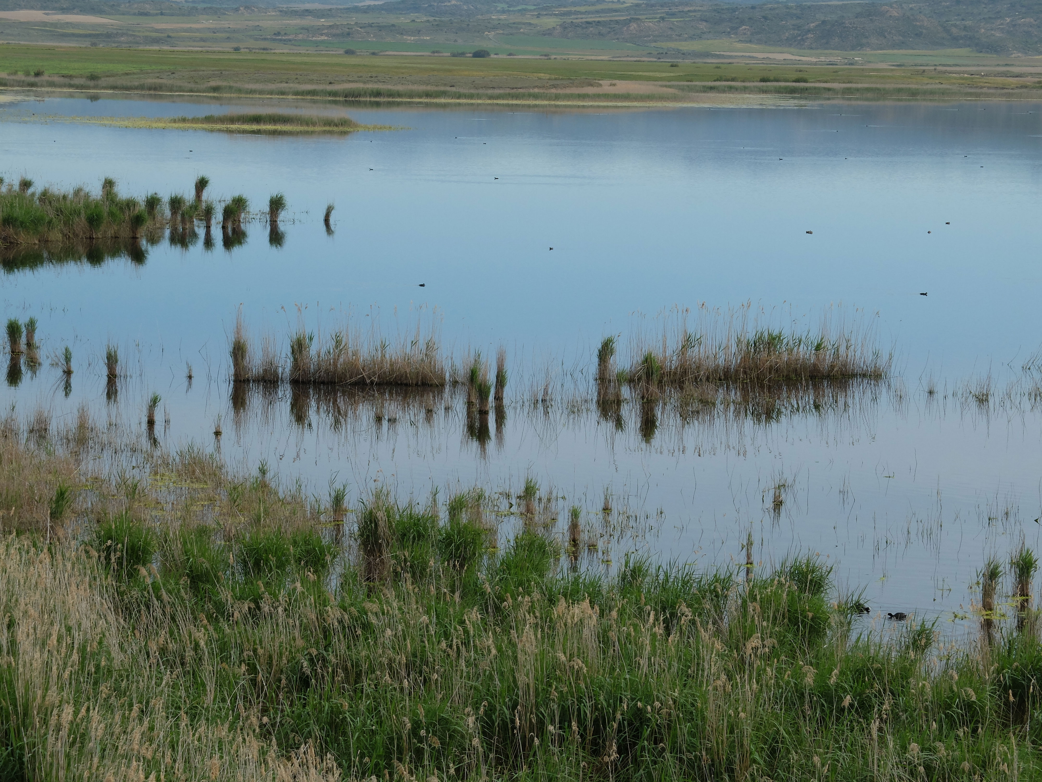 Laguna de Pitillas This is a photography of a Site of Community Importance in Spain with the ID: ES0000133. Natura2000 entry, EEA entry